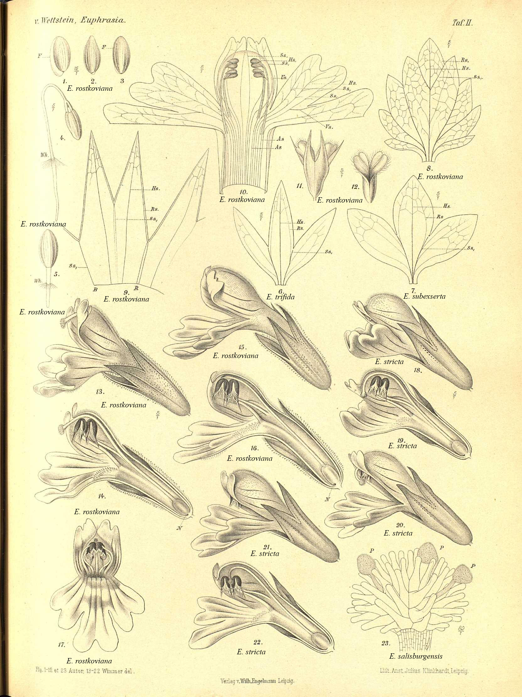 Taf. II from Monographie der Gattung Euphrasia